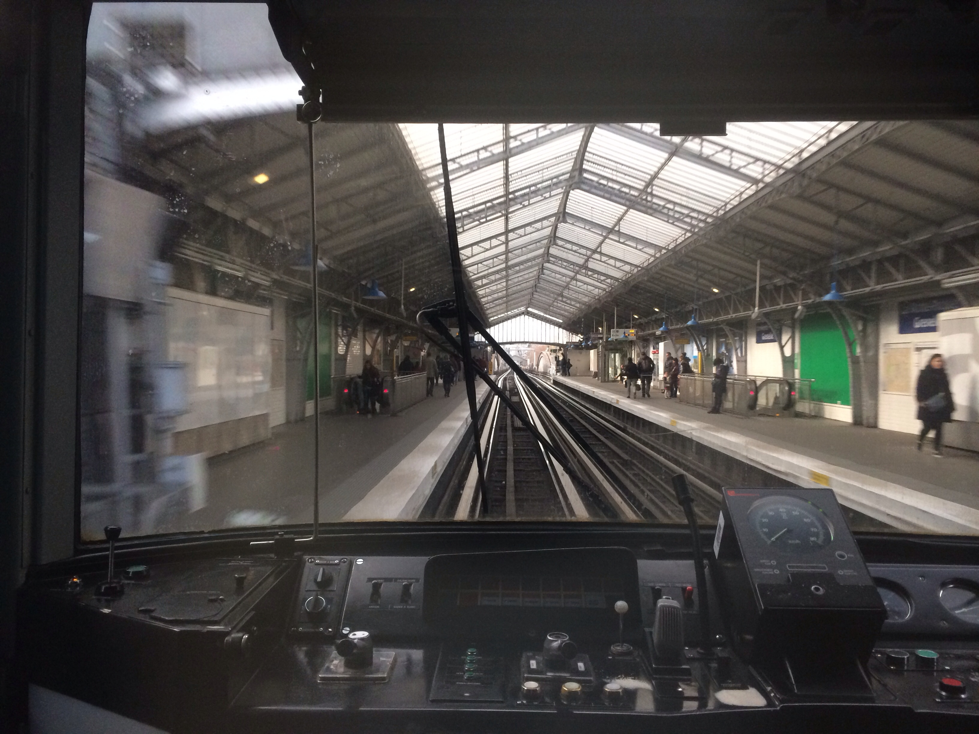 Viaduc ligne 6